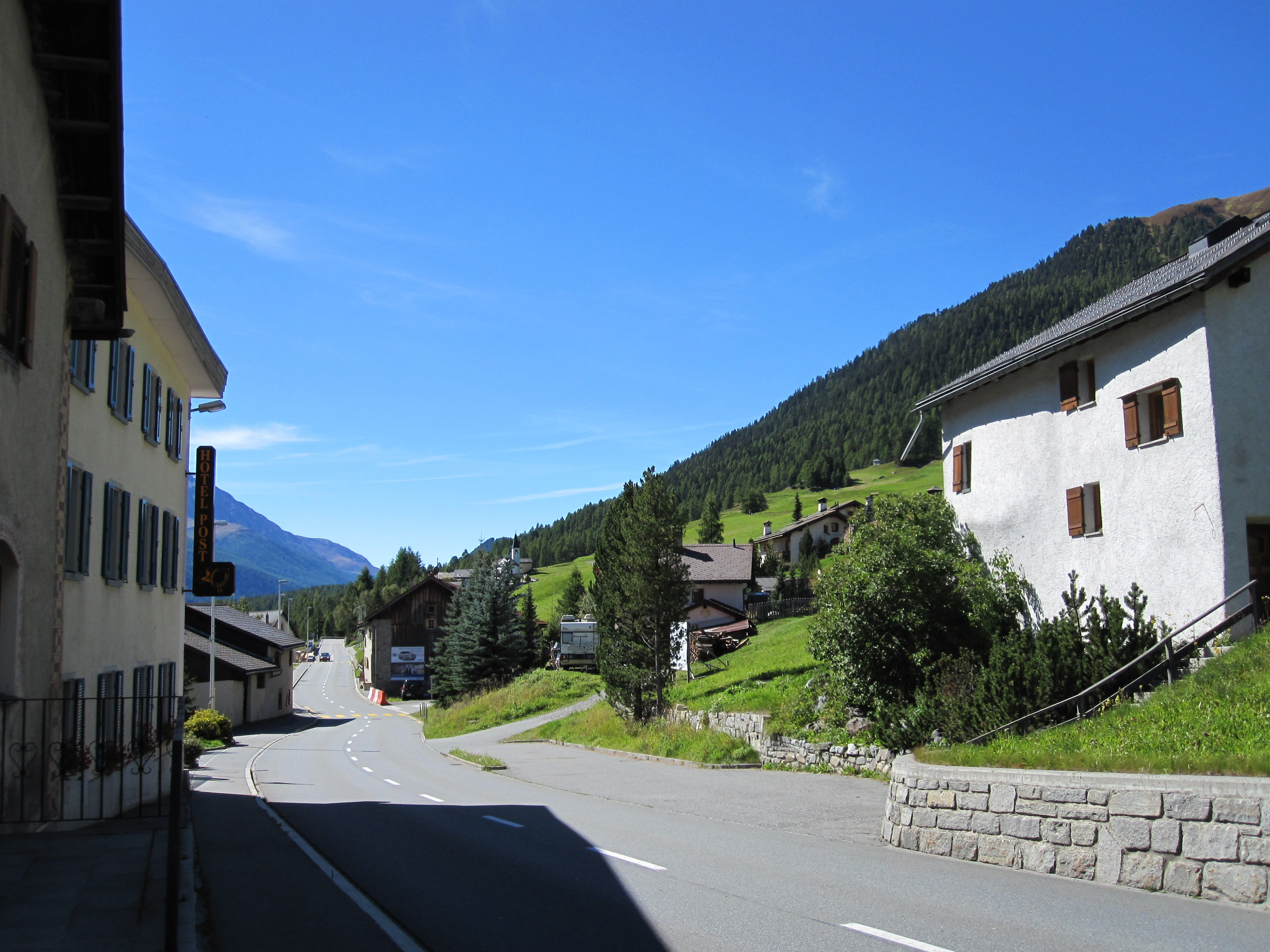 Brail (im Engadin, politisch zu Zernez gehörig)